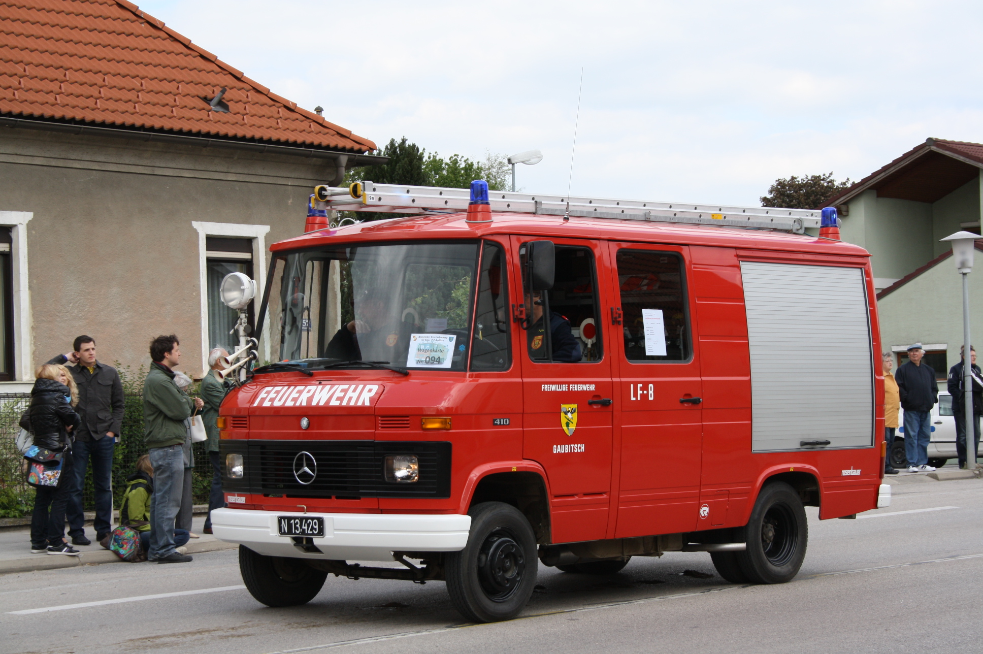 Einsatzfahrzeug der Feuerwehr Gaubitsch